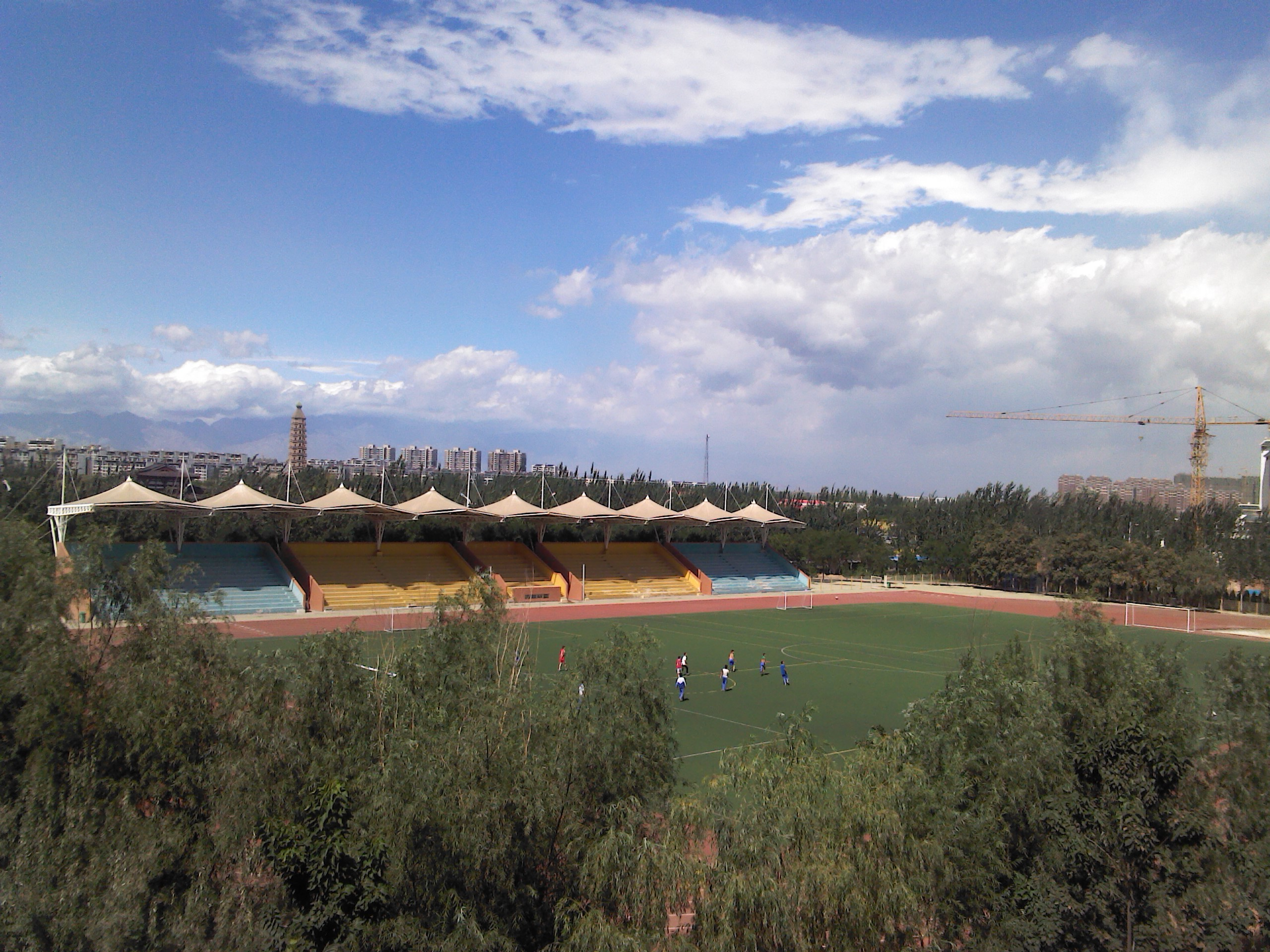 银川二中体育场